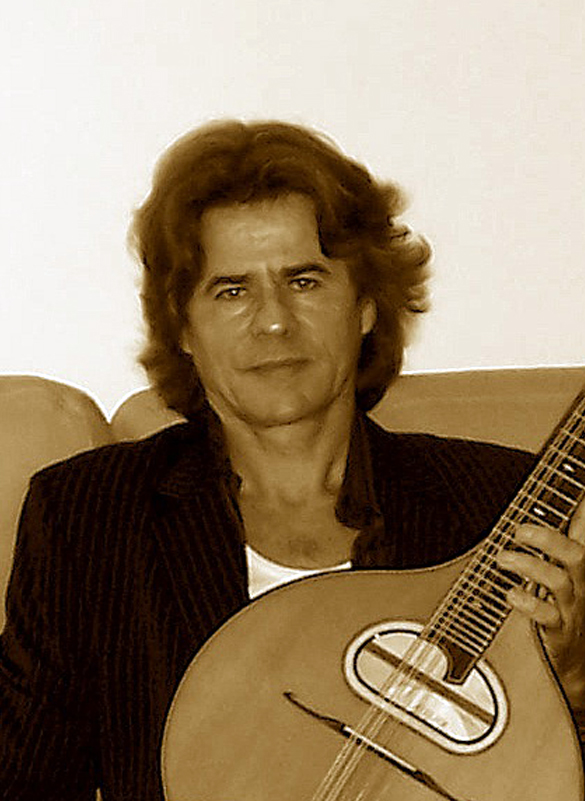 Photo du musicien breton Robert Le Gall prise en 2007 par L. JULIARD.